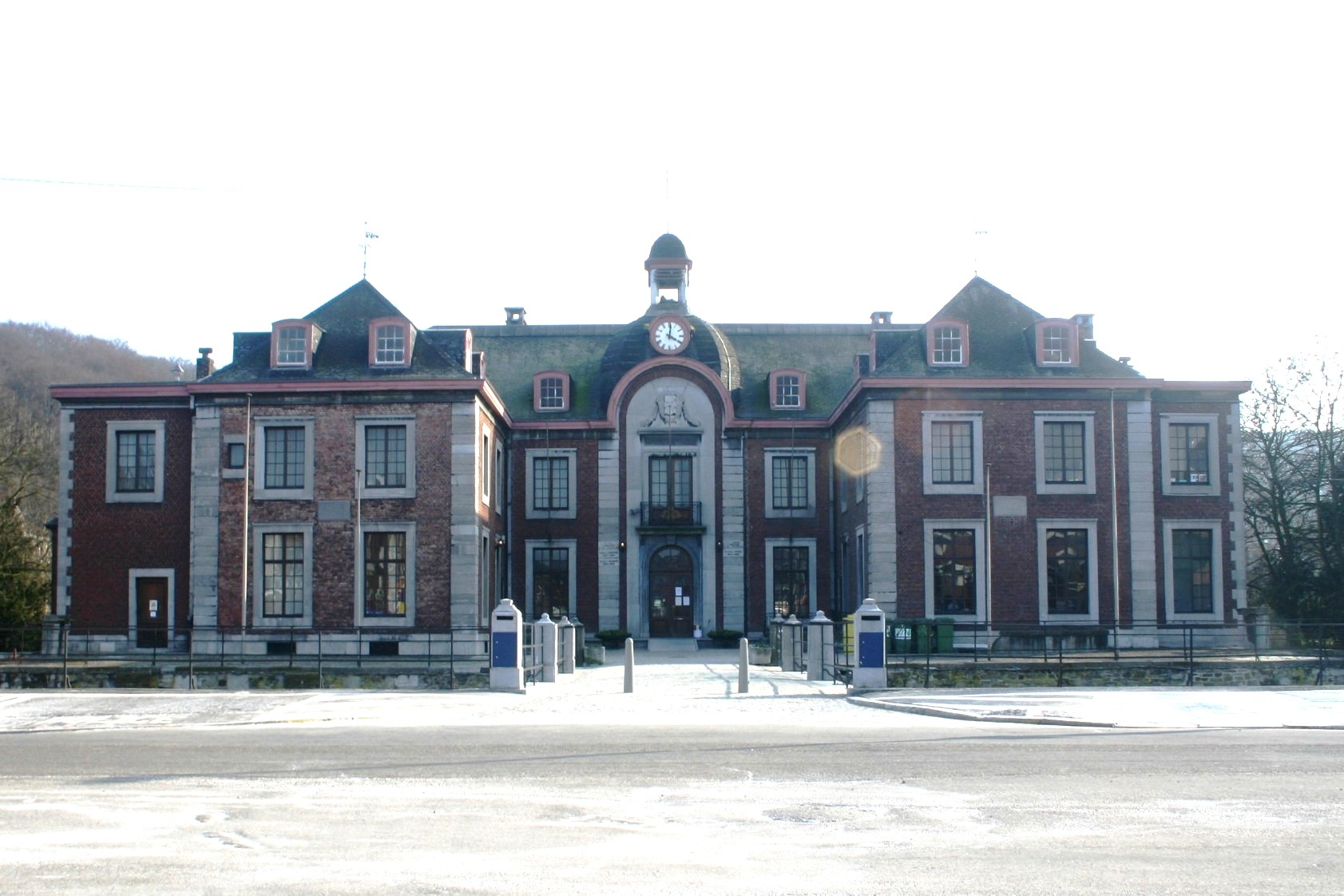 Peralta-Schlass zu Angleur.